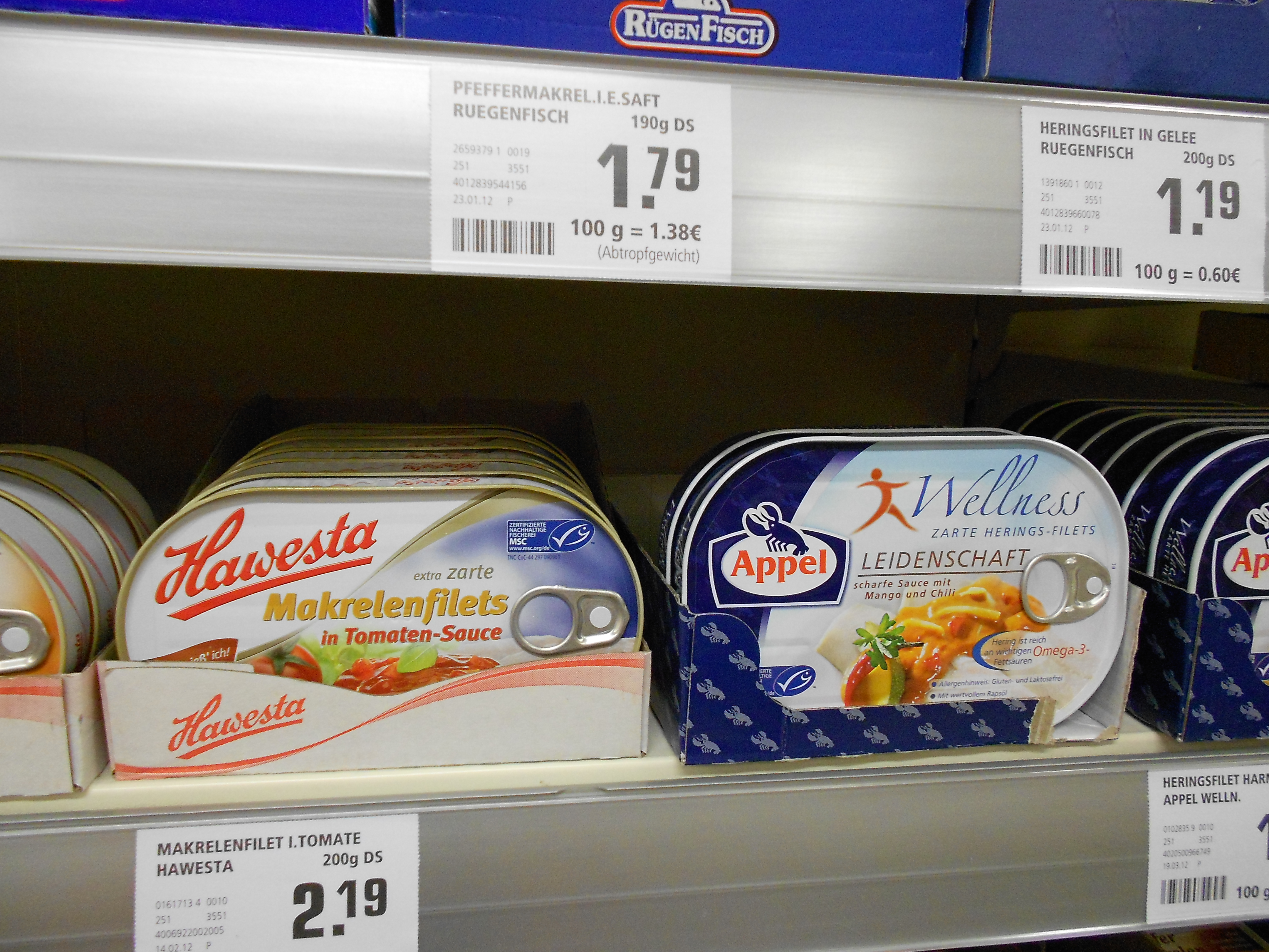 Saucen im Supermarkt